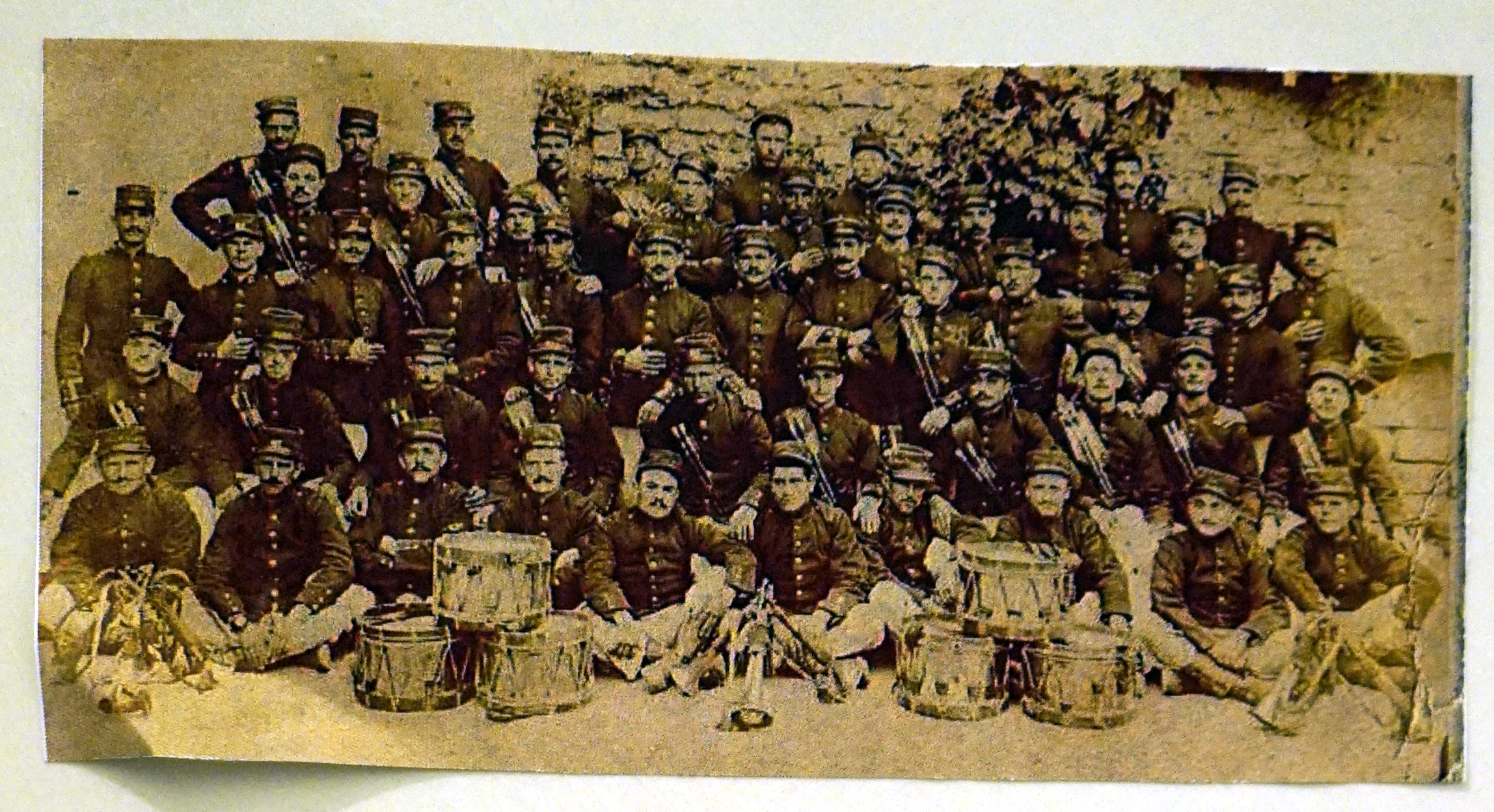 présenté au musée de Toul.